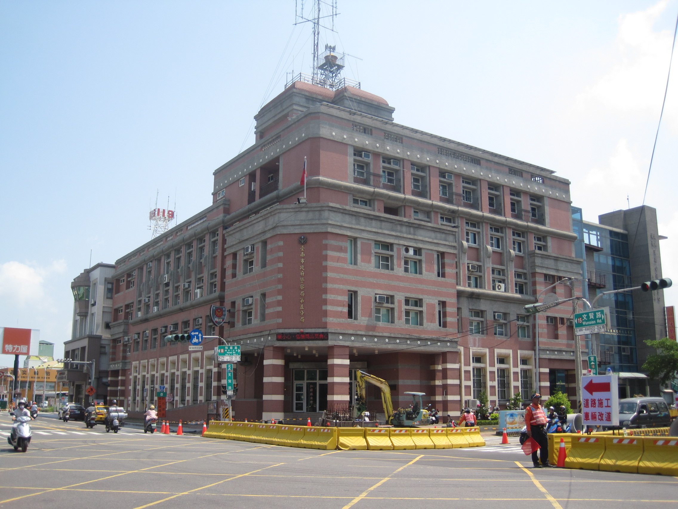 臺南市政府警察局第五分局